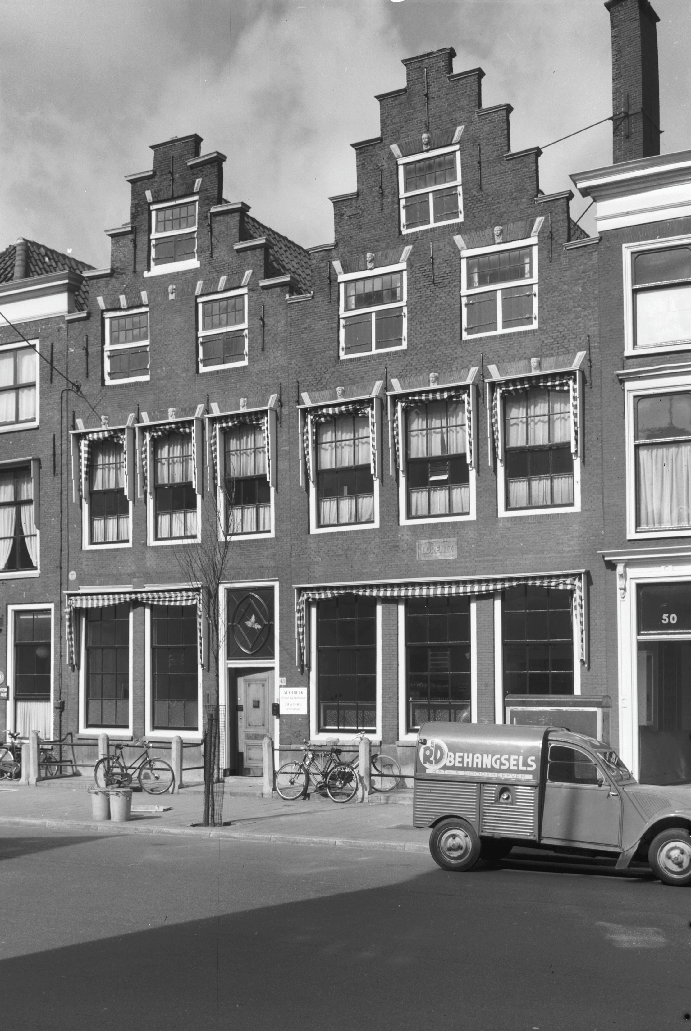 gevel